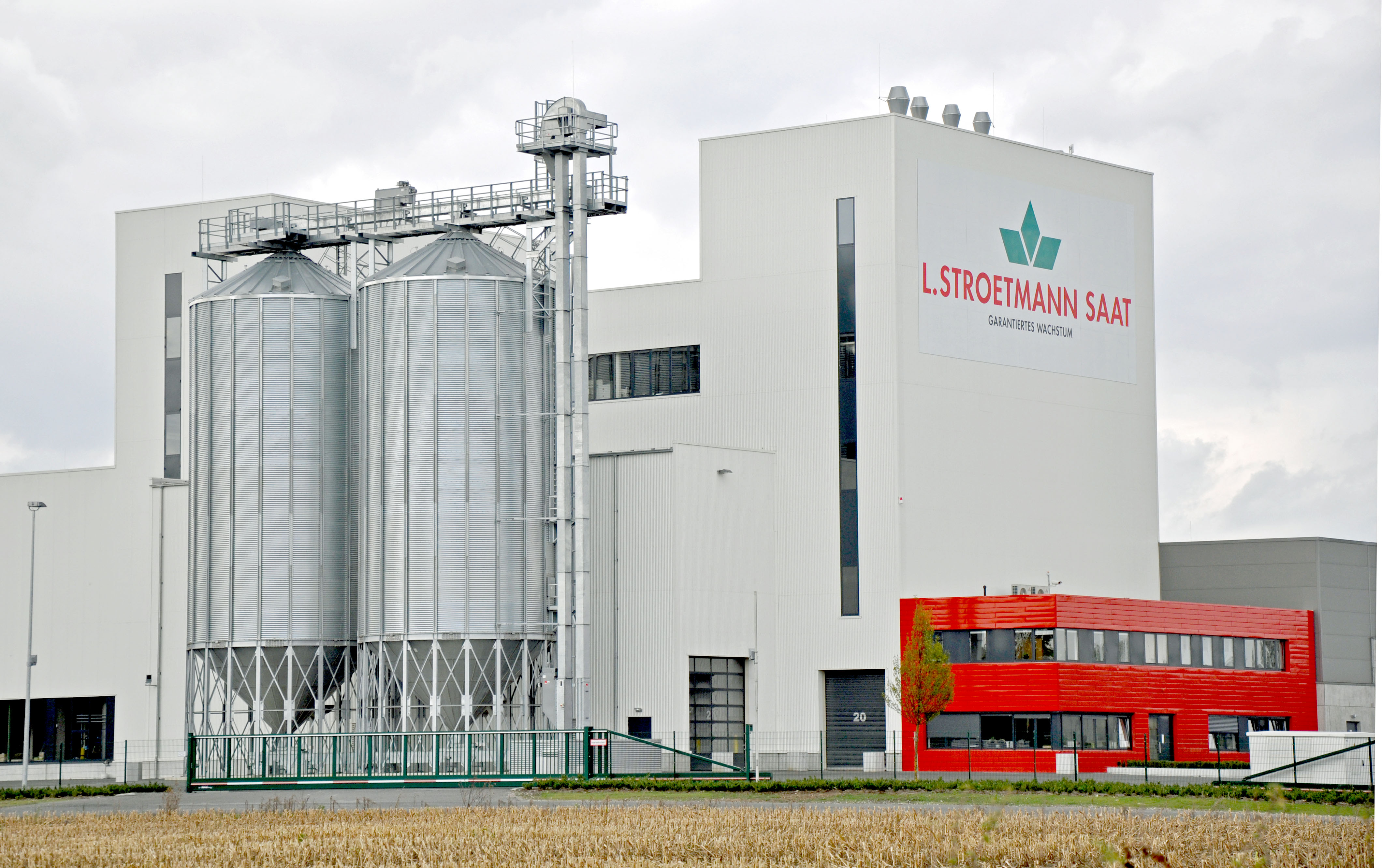 Die Firma L. Stroetmann Saat setzte 2010 den ersten Spatenstich zum Bau eines Saatgut-Zentrum mit Silogebäude, Mischanlagen sowie Abfüll- und Lagerhallenim Hansa-Business-Park bei Münster-Amelsbüren.